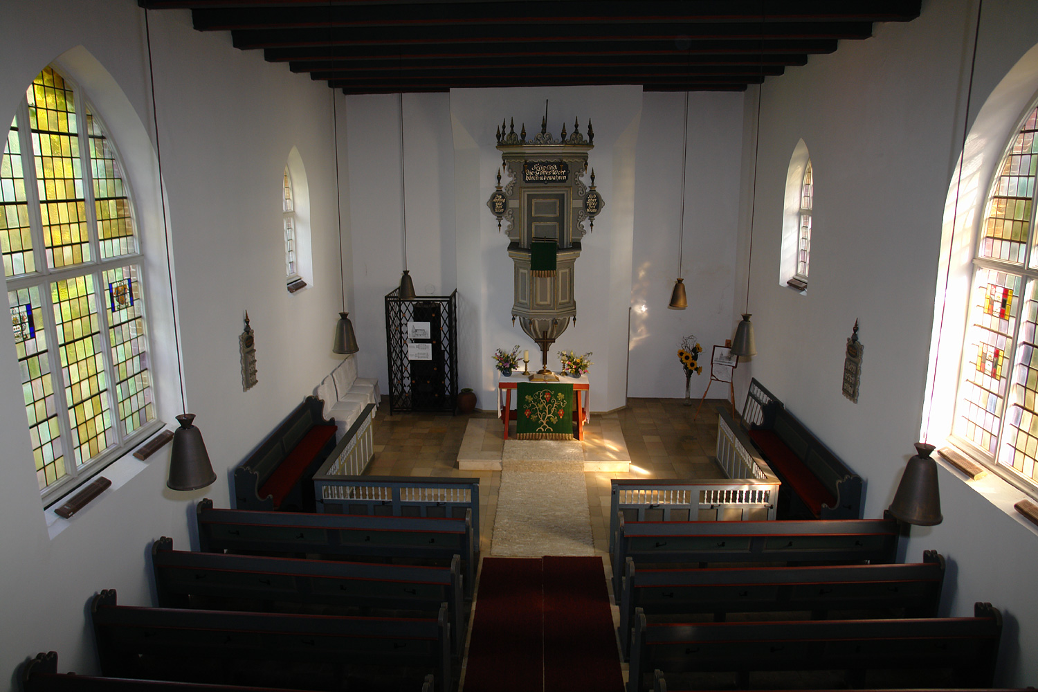 Moorlose Kirche in Mittelsbüren. Frühester neugotischer Kirchenbau in Bremen. Erbaut: 1846-47. Architekt: Anton Theodor Eggers. Seit 1973 unter Denkmalschutz.